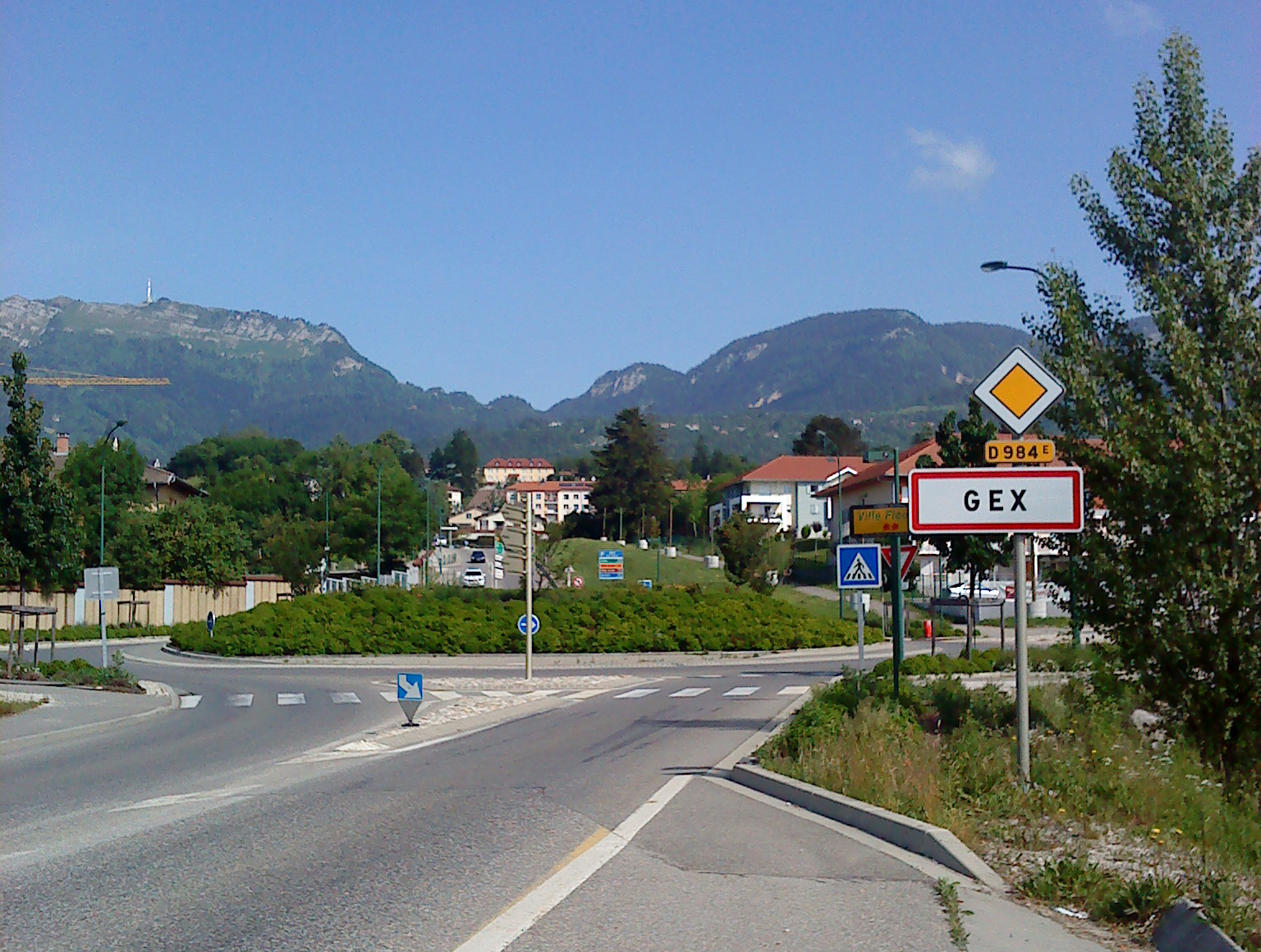 Entrée de Gex (Ain, France) par la route départementale 984E.